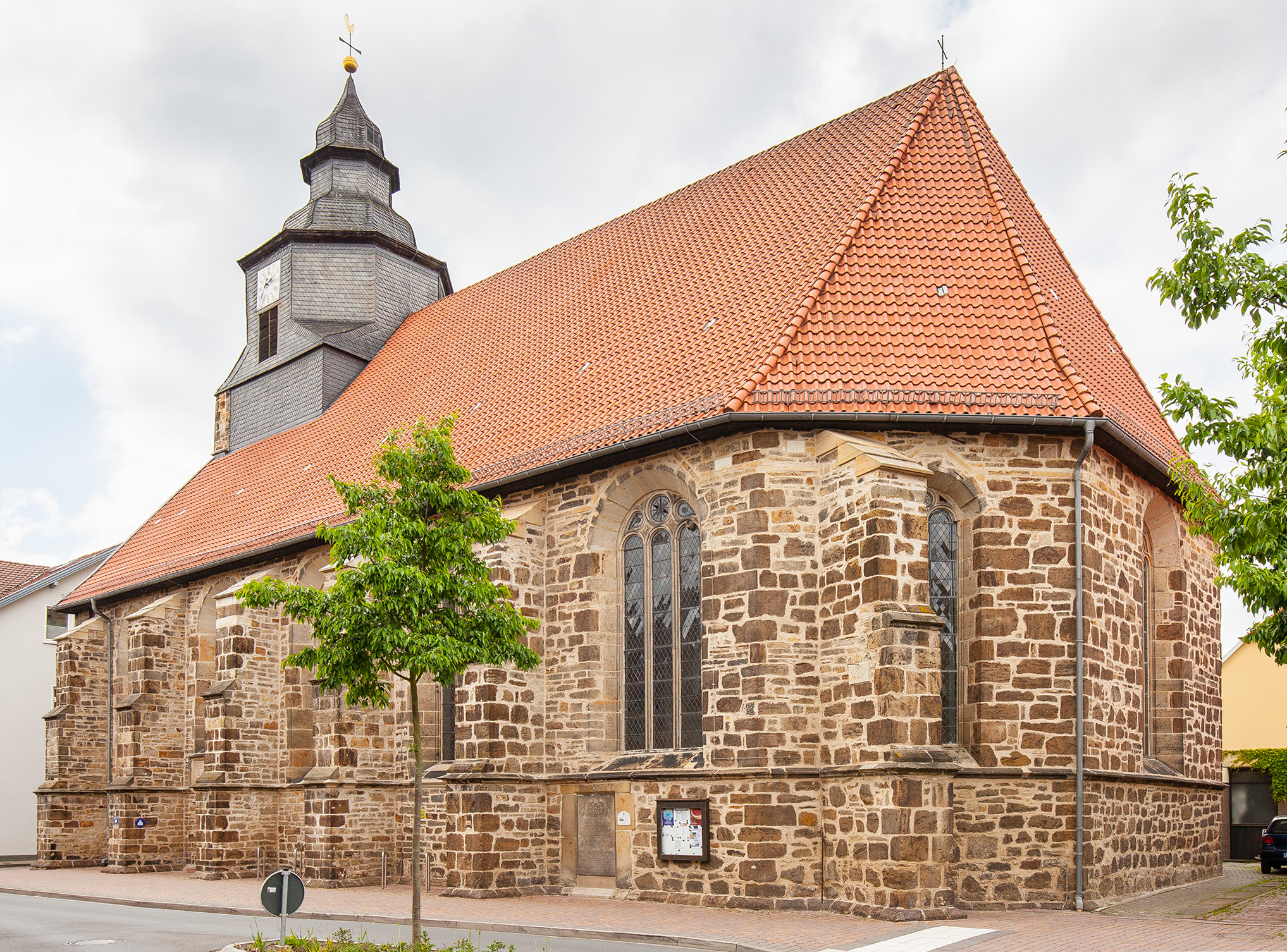 Ev.-luth. Petri-Kirche in Petershagen This image shows a heritage building in Germany, located in the North Rhine-Westphalian city Petershagen (no. 32).